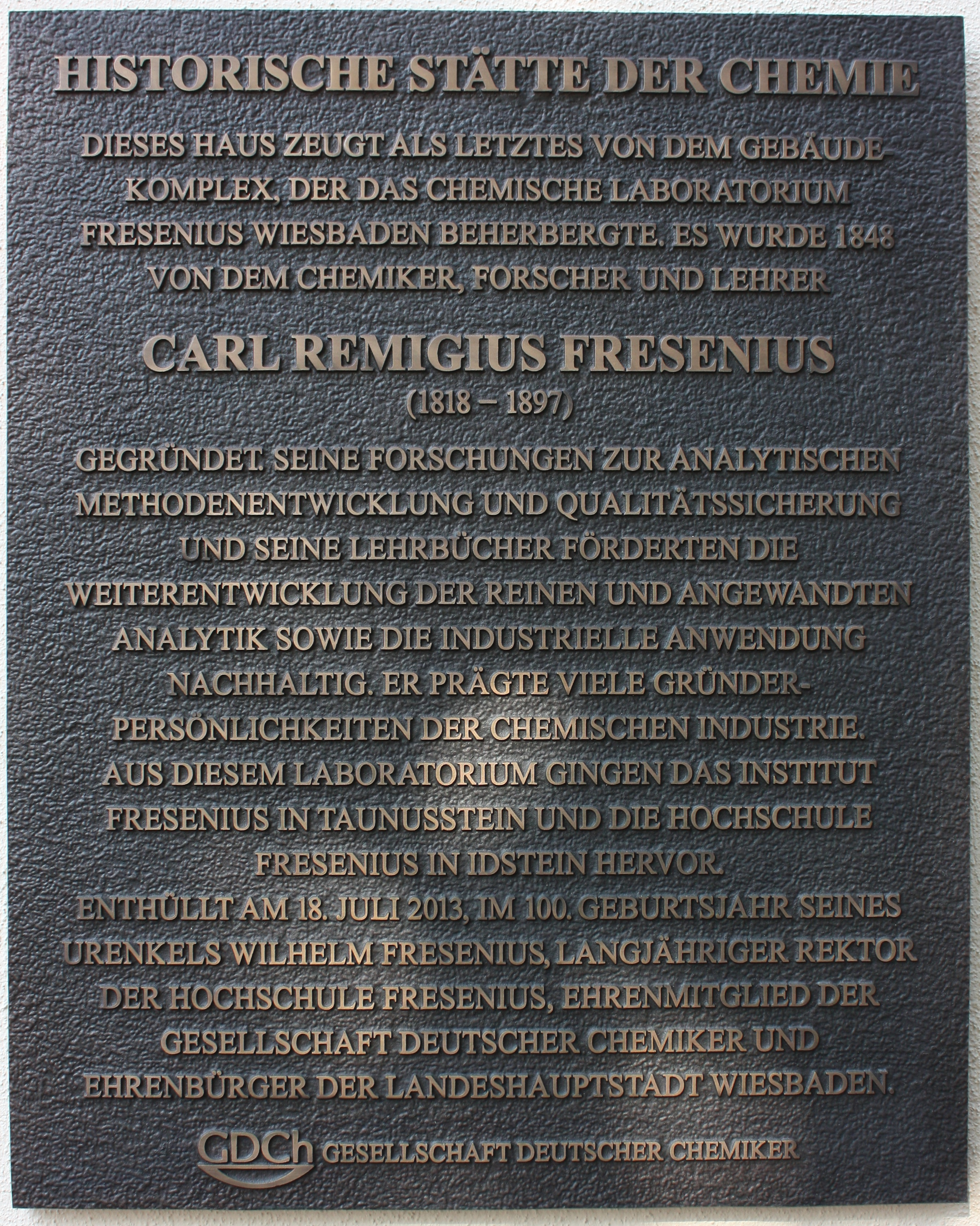 Gedenktafel am denkmalgeschützten Gebäude Kapellenstraße 11, Wiesbaden. Hier war der Standort des "Laboratorium Fresenius". Das Gebäude gehört zu den "Historische Stätten der Chemie" in Deutschland)